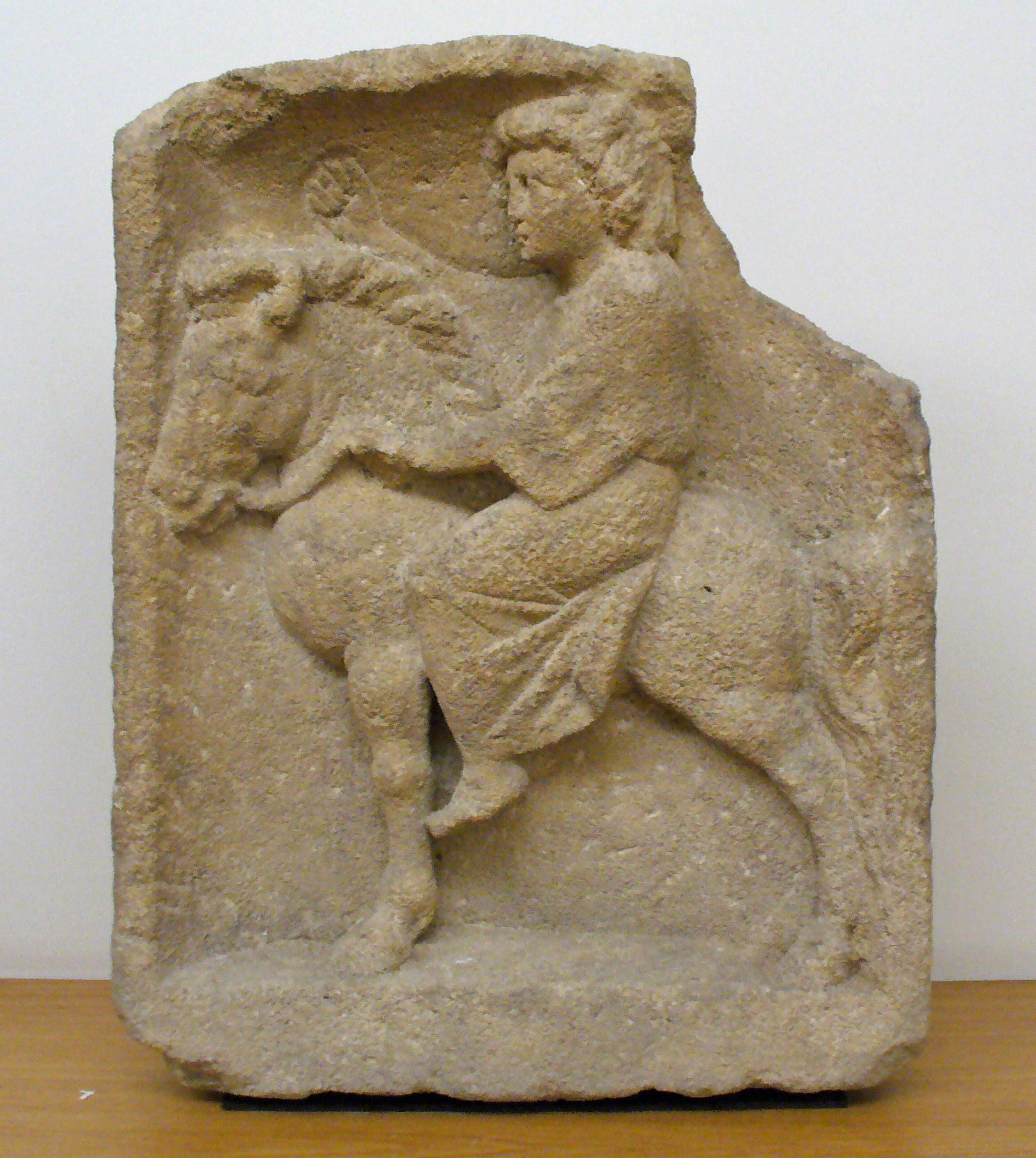 Bas-relief de la déesse romano-celtique Epona, en provenance de Contern (Luxembourg), 2° ou 3° siècle de notre ère.